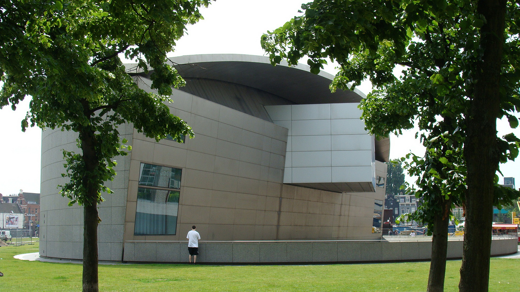 Van Gogh Museum - Amsterdam